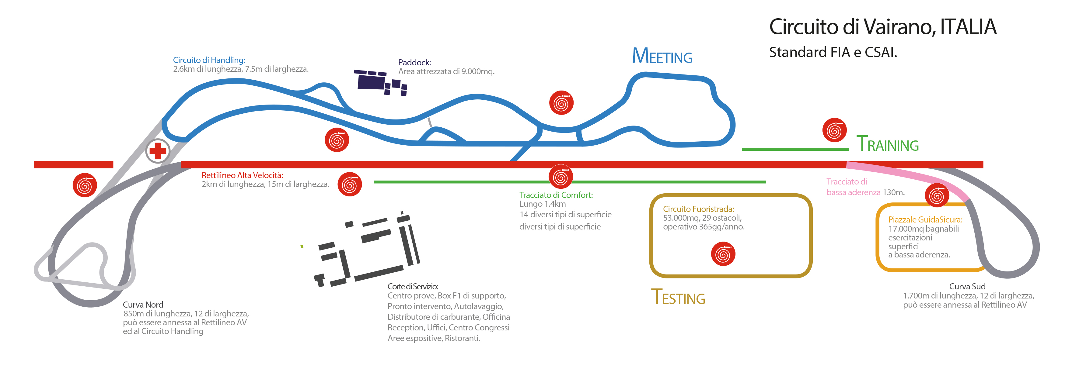 Circuito Test di Vairano, Italia, tracciato con legenda e tutte le info